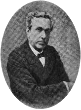 Delaunay, Albert Portrait de Albert Delaunay. Etant donné que ce dernier est décédé en 1892, et que c'est une image scannée, l'image est dans le domaine public.